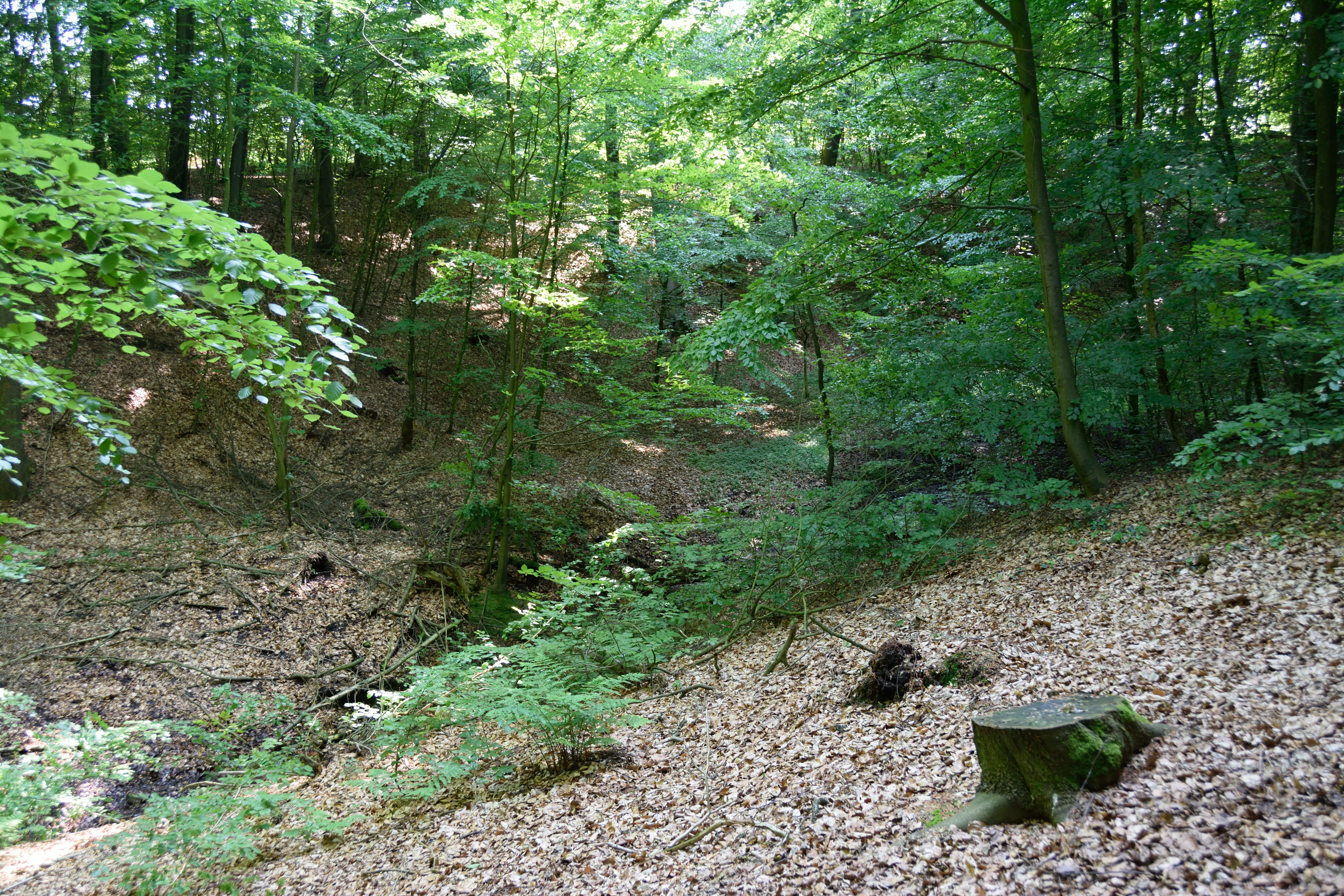 Der Kreis Steinburg hat mehrere Flächen unter dem gemeinsamen Namen "Landschaftsbestandteile und Landschaftsteile im Bereich mehrerer Gemeinden" zusammengefasst. Dieses Foto wurde in der Waldfläche „Bornbusch“ bei Oelixdorf aufgenommen, es ist das Teilstück Nr. 12.